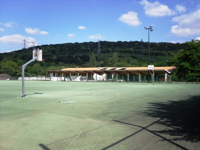 Le centre sportif du Ratel à Bièvres (91)